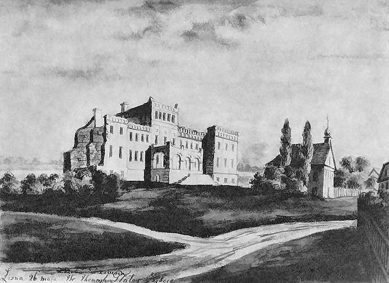 Ruiny zamku Zybergów i kościół p.w. Jezusa, Marii i Józefa. Widok od strony drogi. Pałac dwukondygnacjowy z ryzalitami bocznymi, zwieńczony attyką; w trzykondygnacjowej części środkowej taras wsparty na arkadach i zewnętrzne schody; z prawej stronyjednonawowy kościół z sygnaturką nad wejściem.